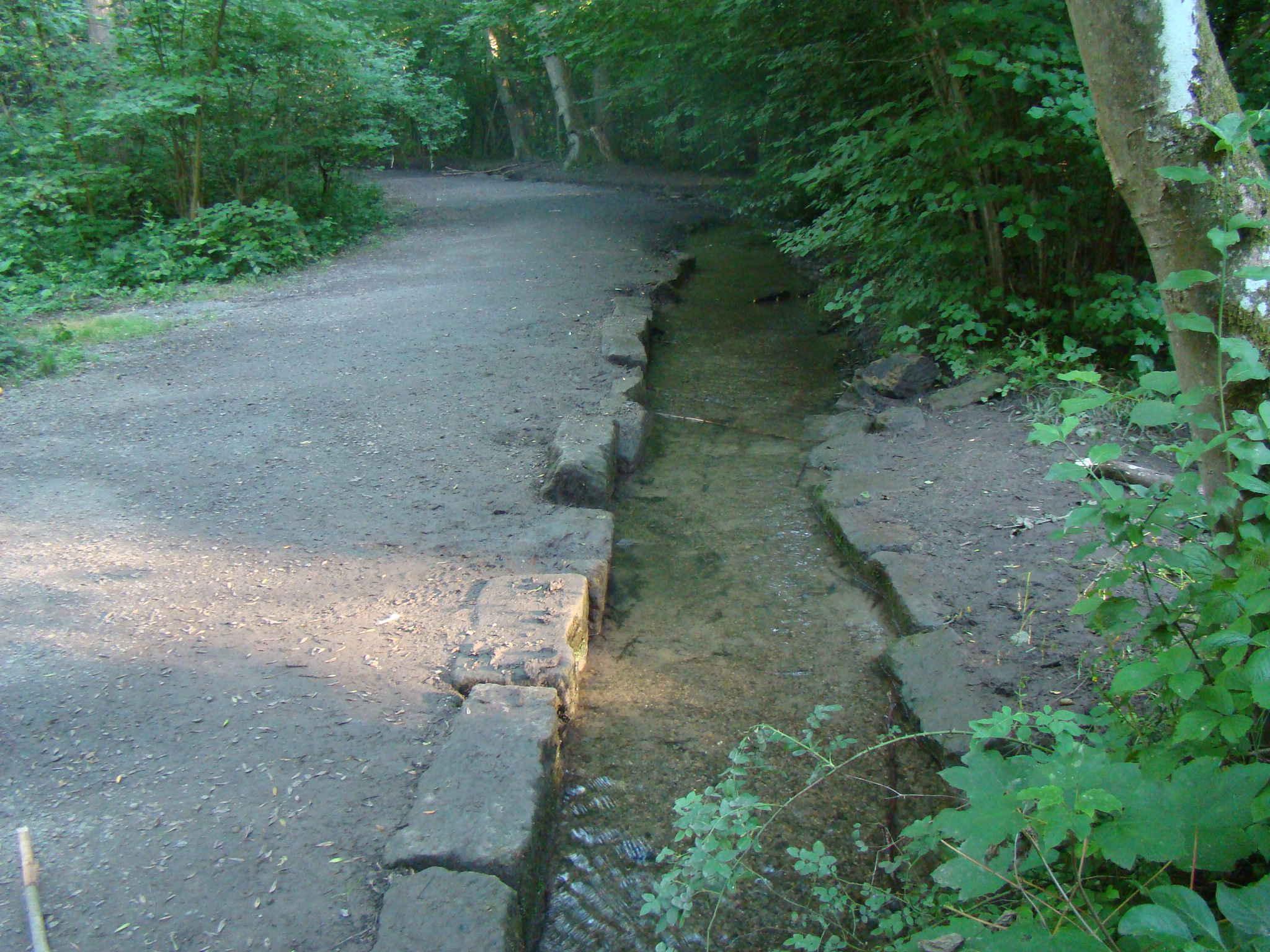 Köpfertal in Heilbronn